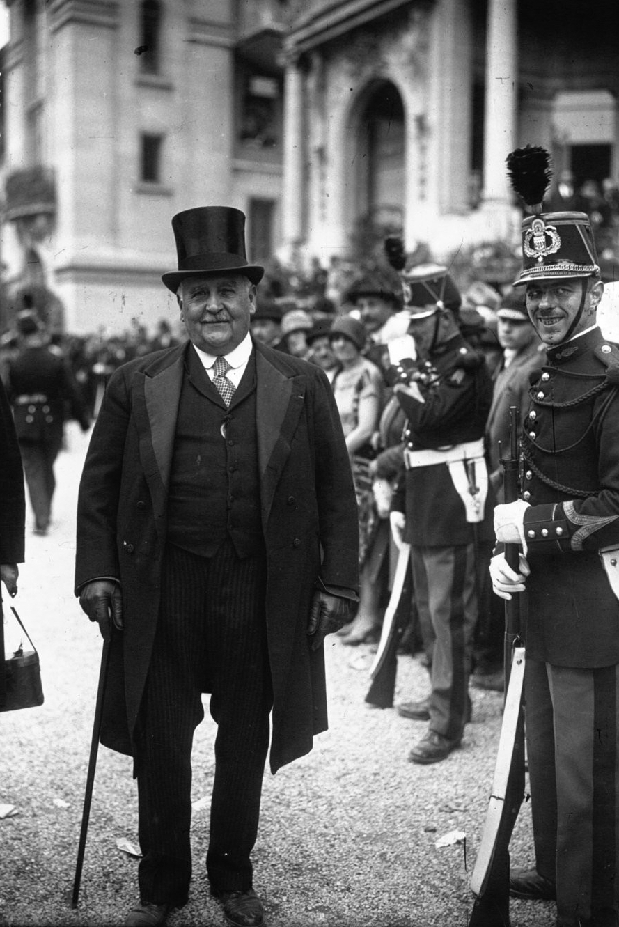 Longchamp : Grand Prix de Paris : M. Hennessy propriétaire de "Take my Tip"